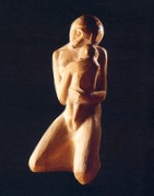 Peter Horn Werner, nació en Munich, Alemania, el 8 de abril de 1908 y falleció en Santiago de Chile, el 11 de abril de 1969. Fue un connotado escultor religioso alemán - chileno